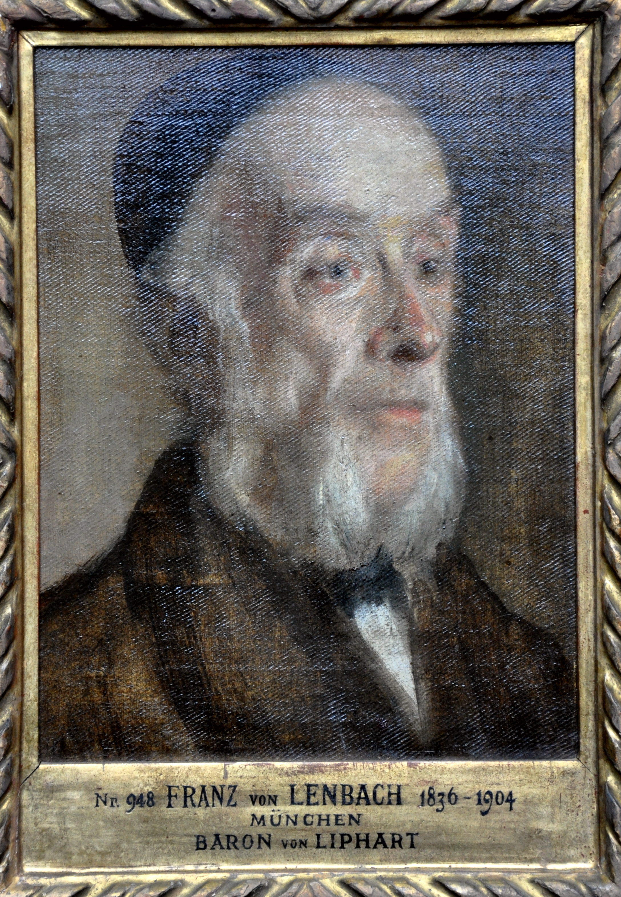 Porträt des Barons Carl Eduard von Liphart